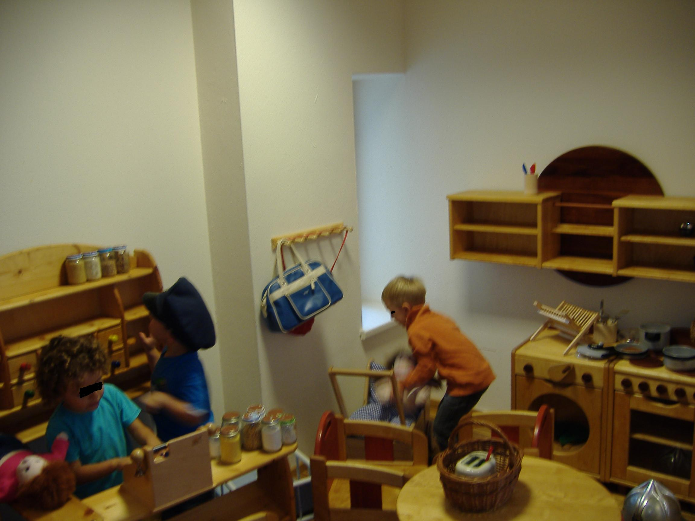 Schörlpädagogik: Puppenwohnung